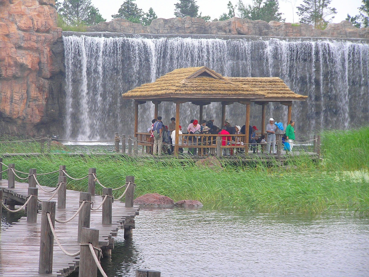 [編集] 太陽滝 面積約1.5万㎡、長さ132m、高さ7m。太陽滝は太陽島が3期改造工事の際に新たに造られた人造の滝で、以前はハルビン市の第3中学校（zh）の外国語部があった場所である。人工滝は7mの落差から落下しており、自然な壮観さには及ばないが、観光客には人気がある。滝の洞穴内はユニークな長い回廊になっており、鐘乳洞を模している。